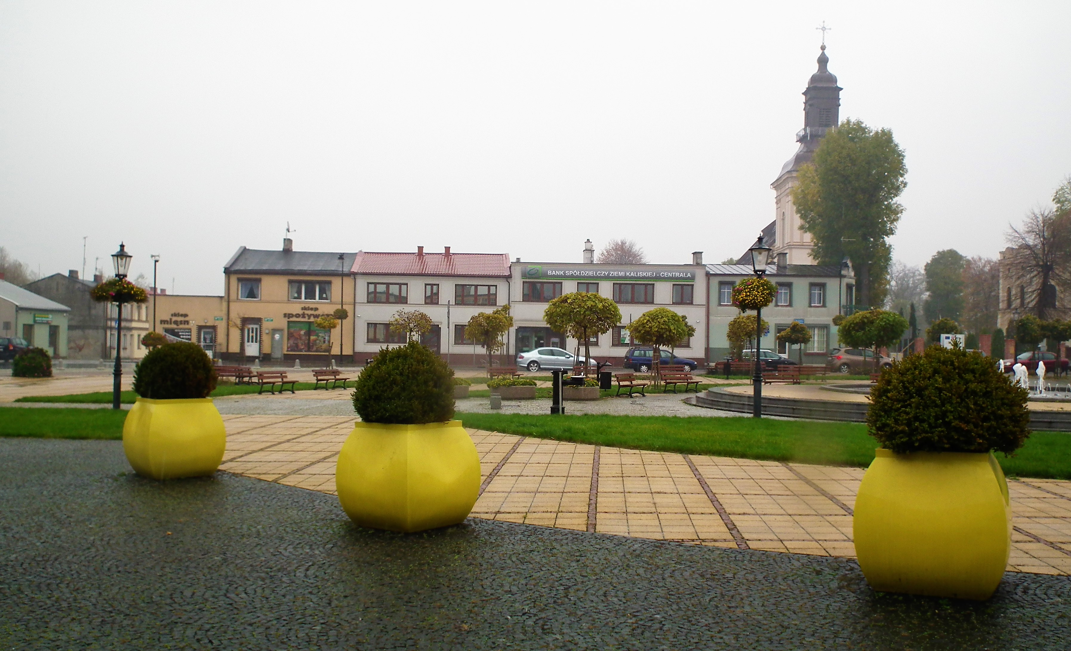 Rynek w Koźminku.